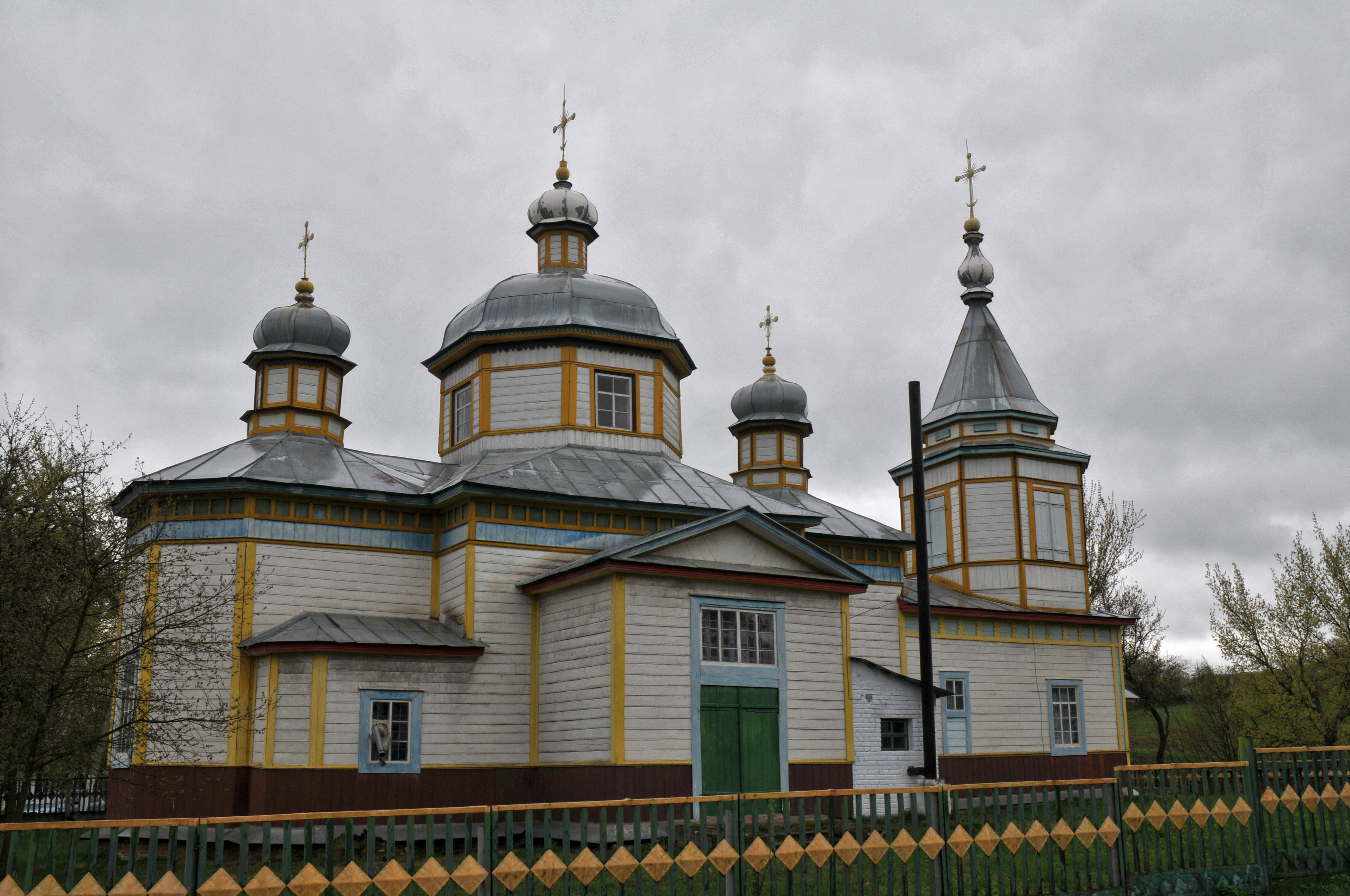 Розкопанці, Іванівська церква